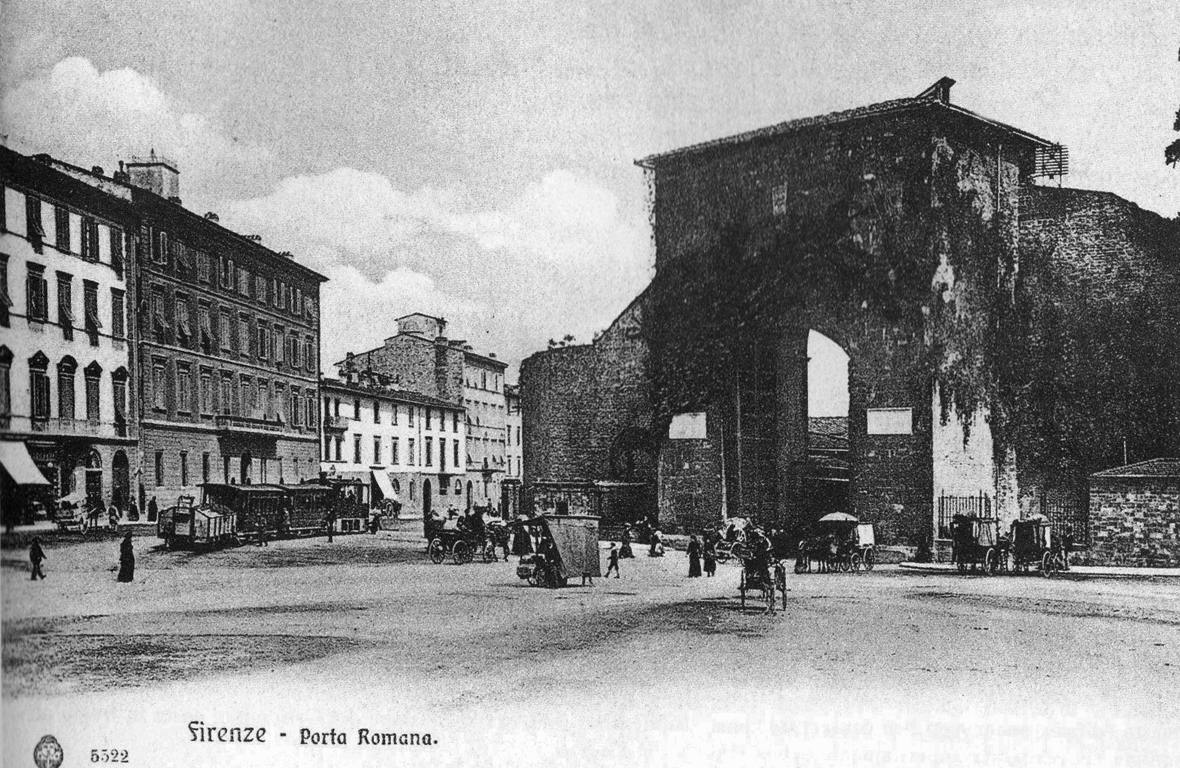 Treno misto della Tranvia del Chianti ripreso al capolinea di Porta Romana a Firenze.